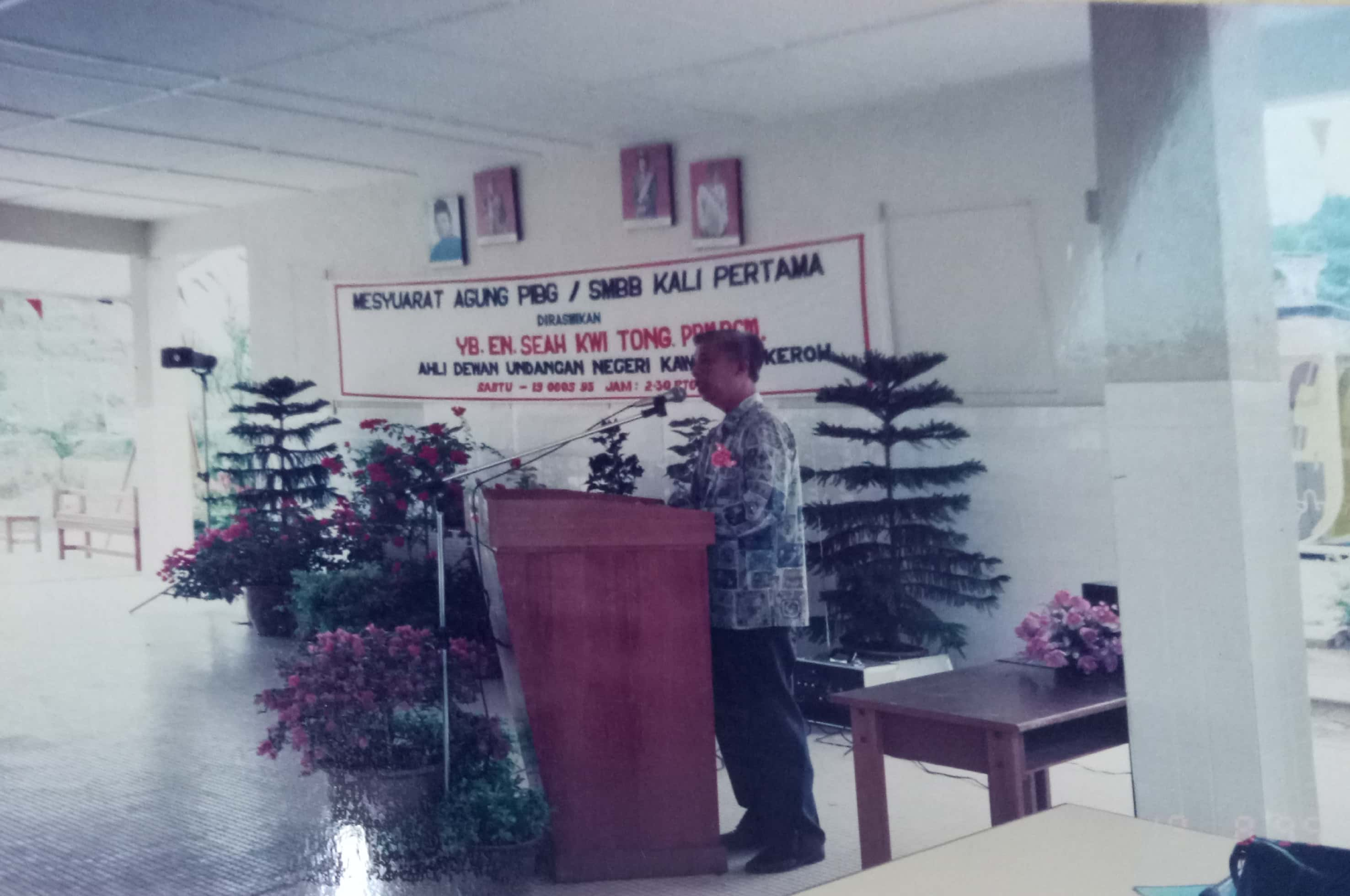 Ucapan oleh Pengetua